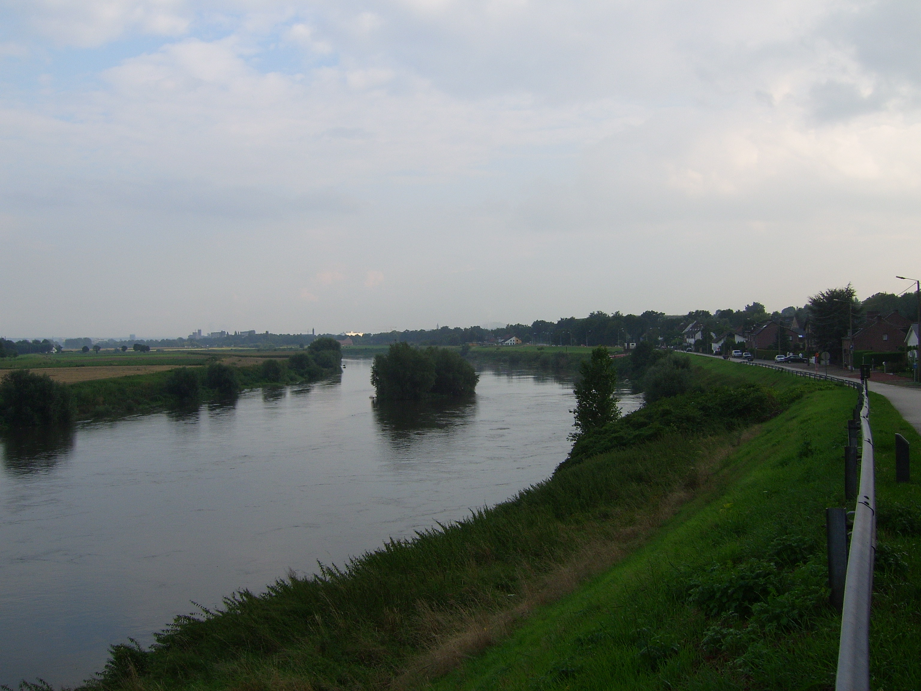 Lanaken.